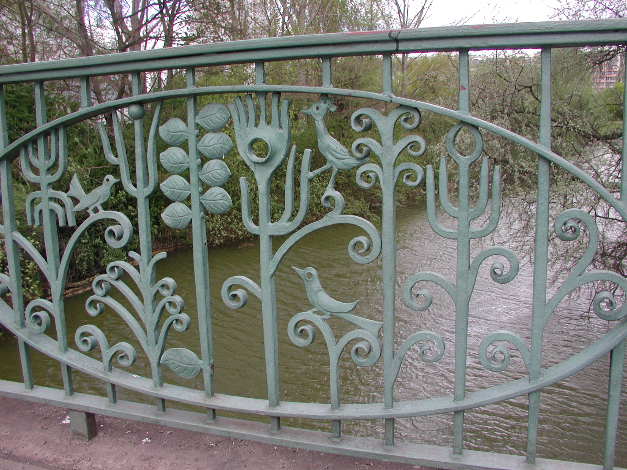 Geländer an der Fußgängerbrücke über den erweiterten Fennpfuhl